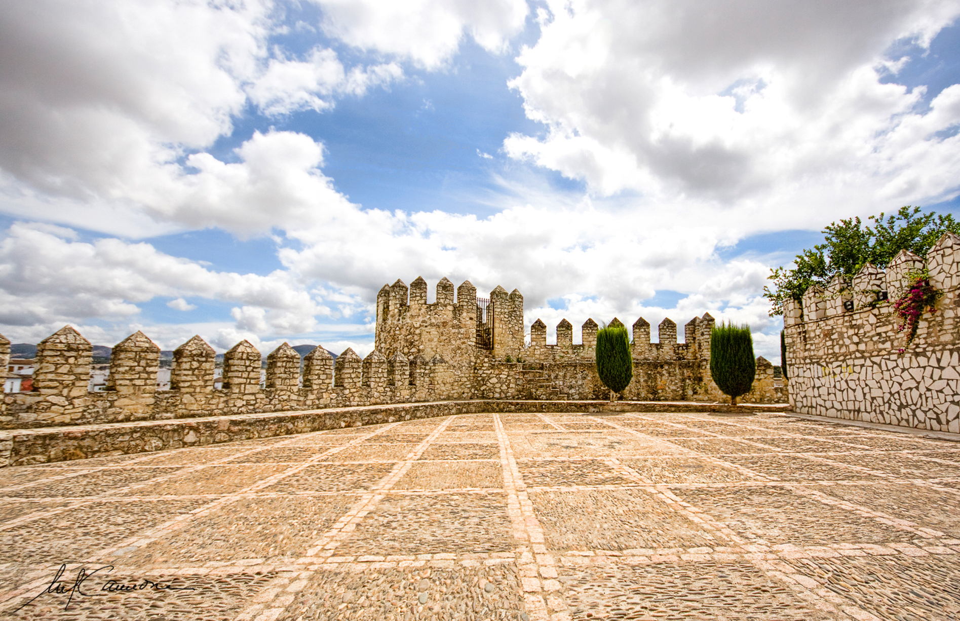 Murallas de la ciudad vieja en Cabra (Córdoba)